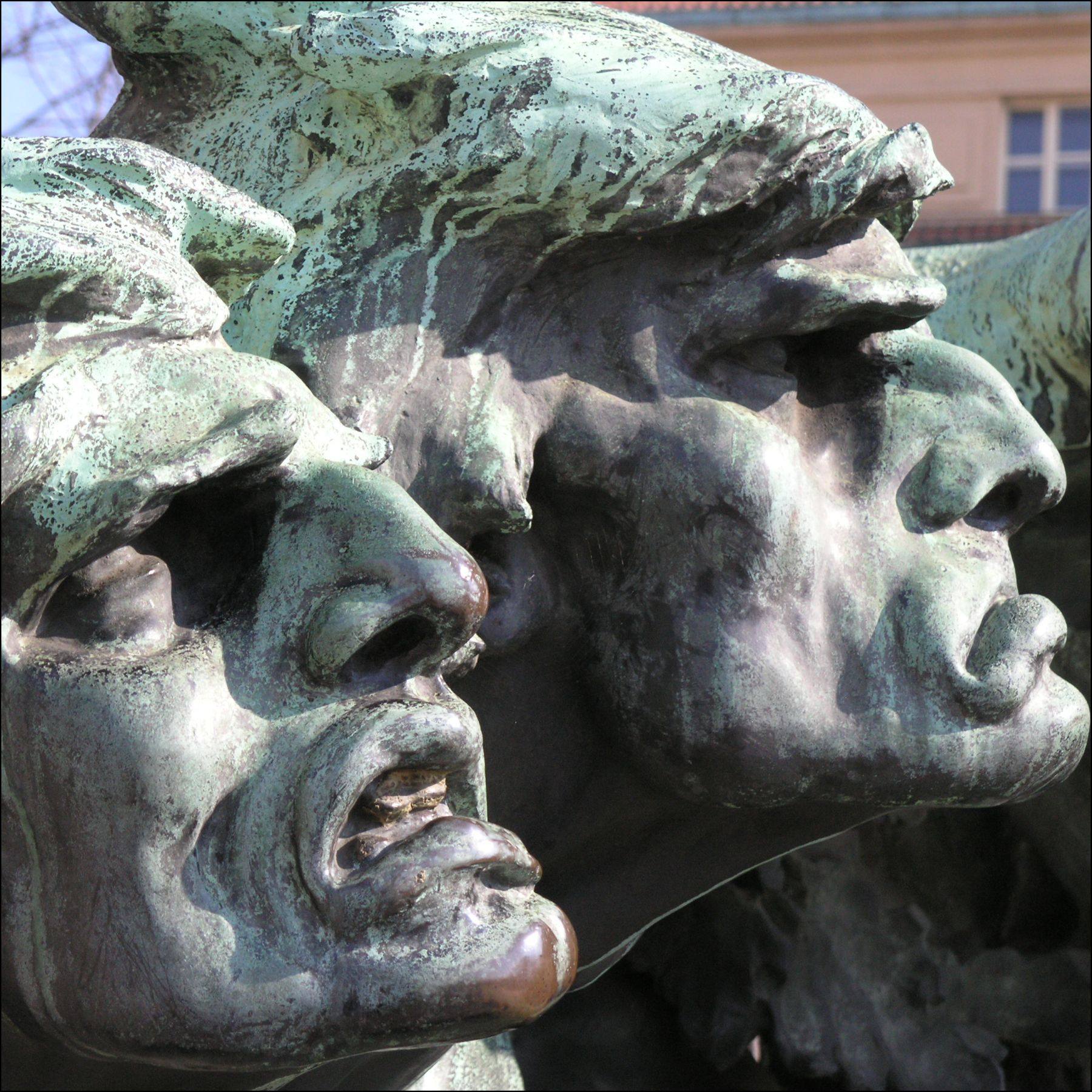 Detail sousoší pomníku Františka Palackého od Stanislava Suchardy na Palackého náměstí v Praze